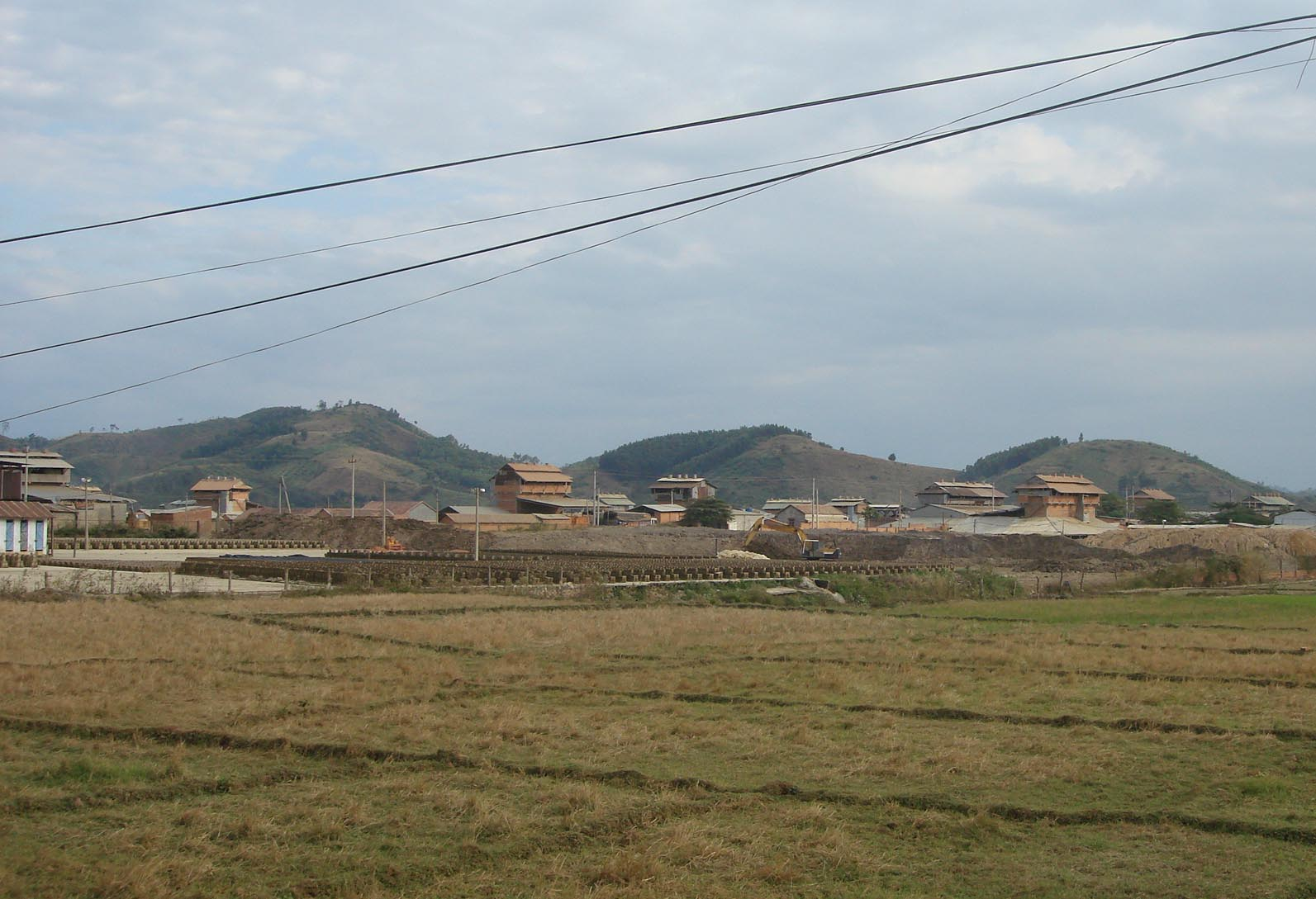 Lò gạch xã Ea Bông